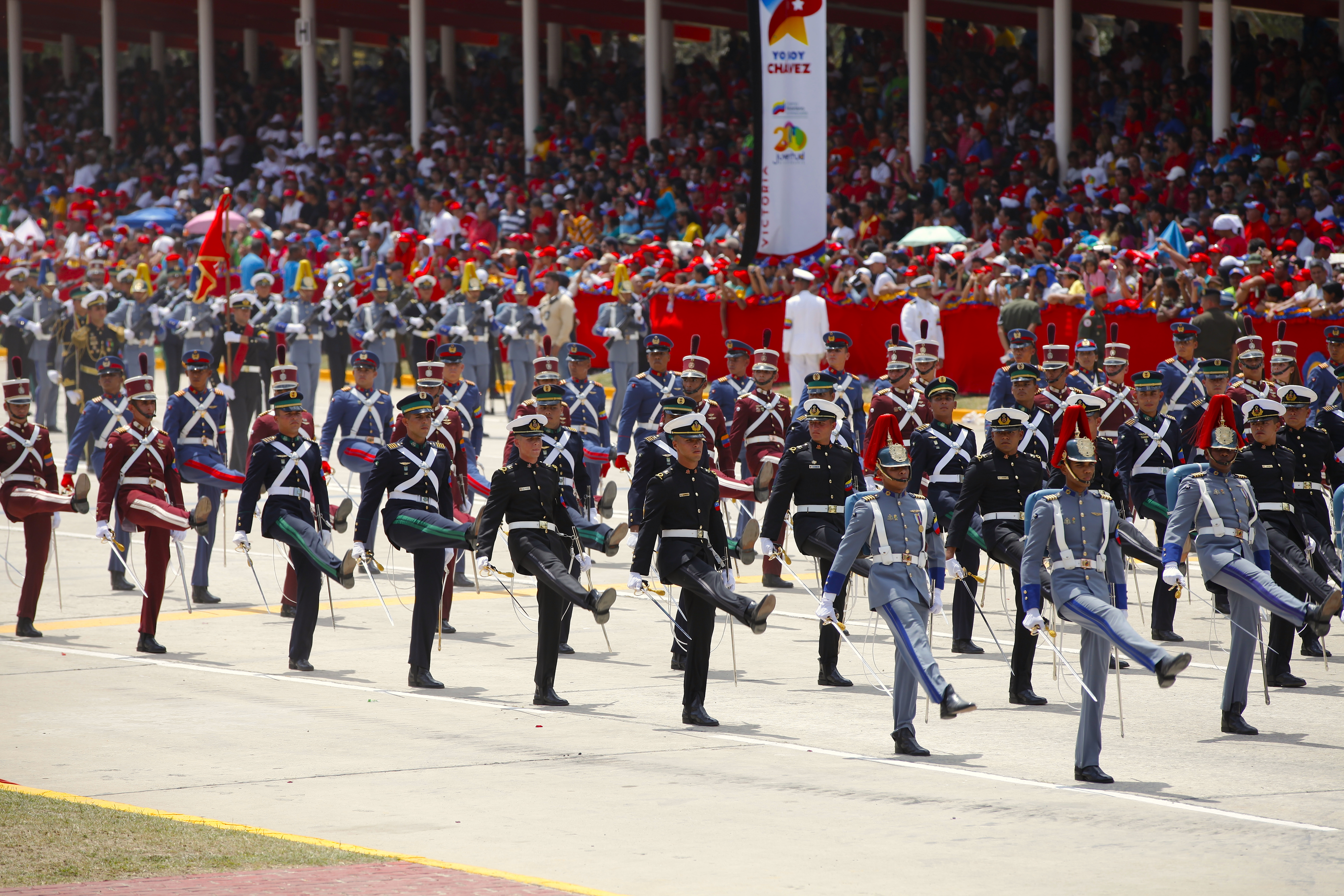 Caracas (Venezuela), 05 de Marzo del 2014. El Canciller del Ecuador, Ricardo Patiño, participó en los actos de conmemoración de la muerte del Comandante Hugo Chávez Frías. Foto: Xavier Granja Cedeño / Cancilleria Ecuador